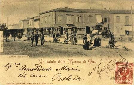 Marina di Pisa, arrivo del tram